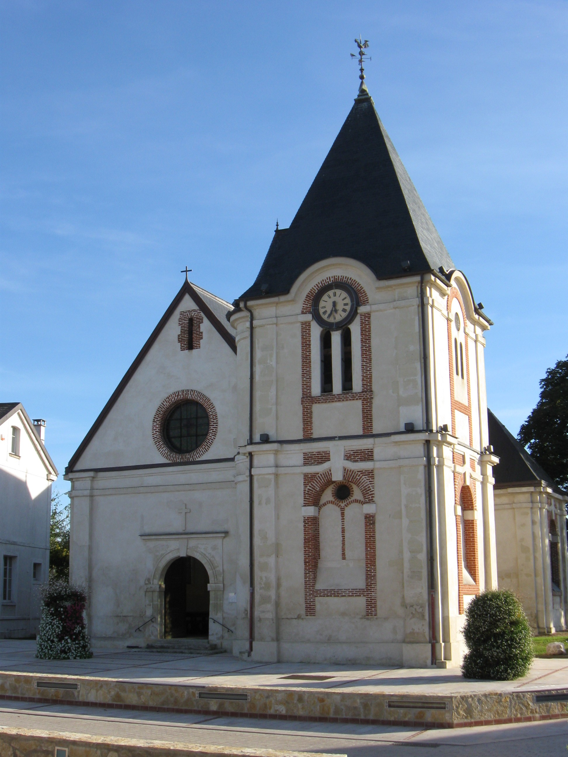 Église Saint-Sulpice de Fresnes-sur-Marne. (Seine-et-Marne, région Île-de-France).